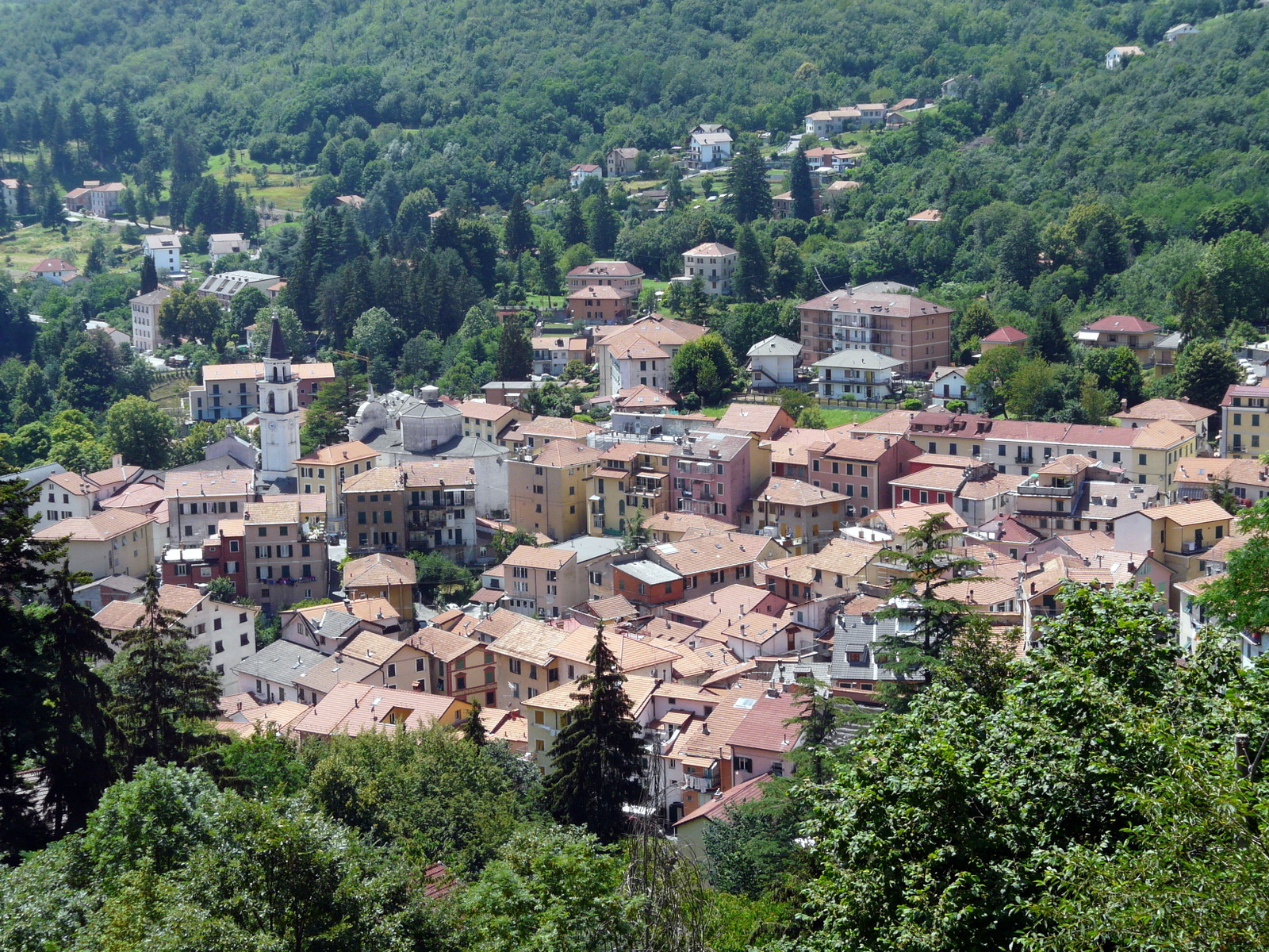 Panorama di Torriglia, Liguria, Italia